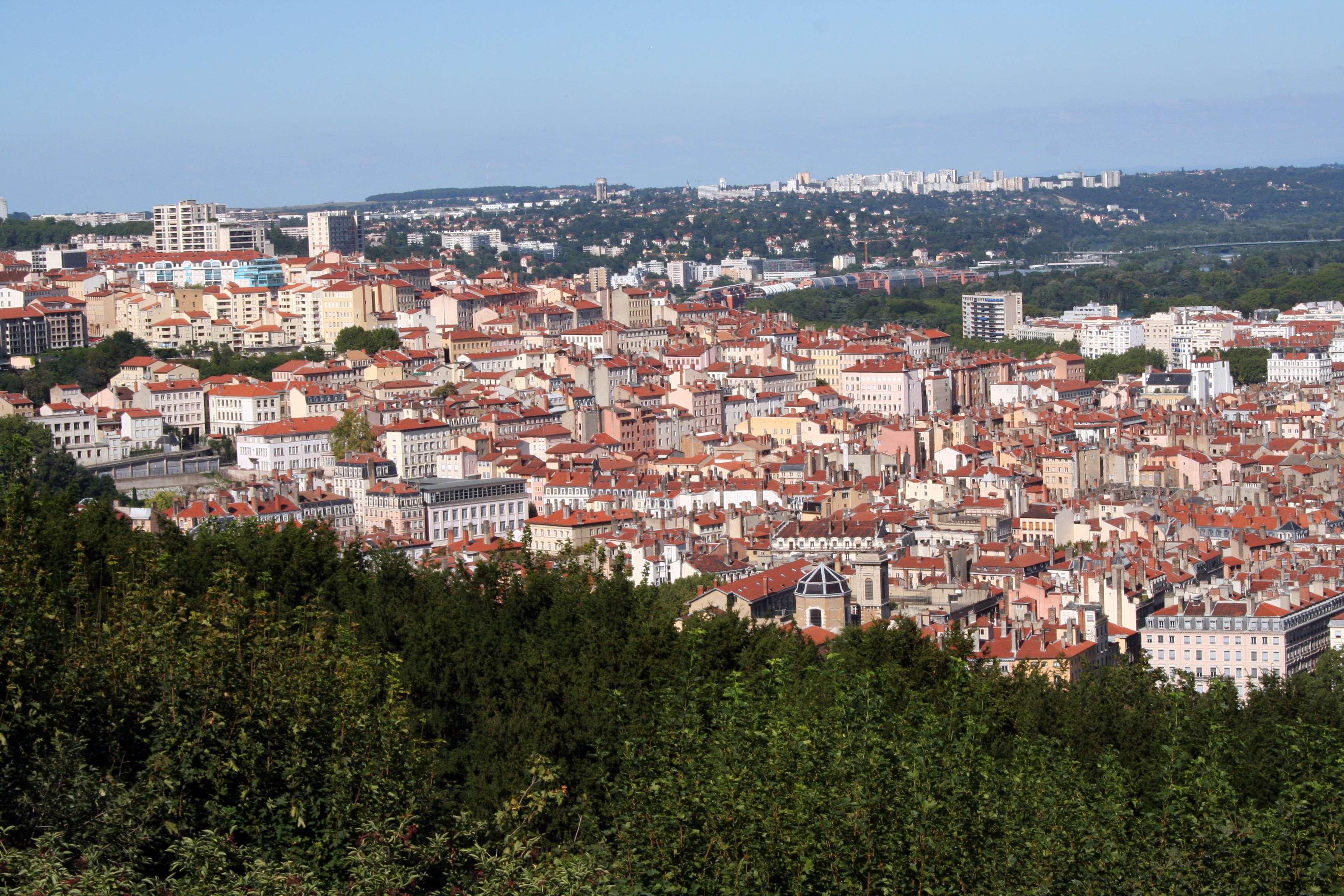 La colline de la Croix-Rousse vue de la colline de Fourvière